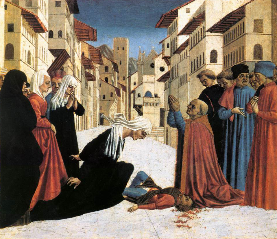 predella 4